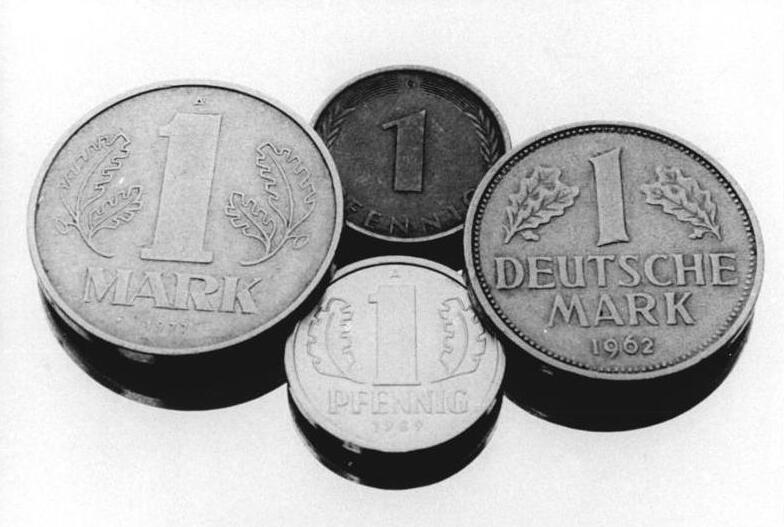 24.4.90 Berlin: Währungsunion-1:1 bei Löhnen, Gehältern Renten, und wieviel bei den Sparguthaben? ADN-Grimm